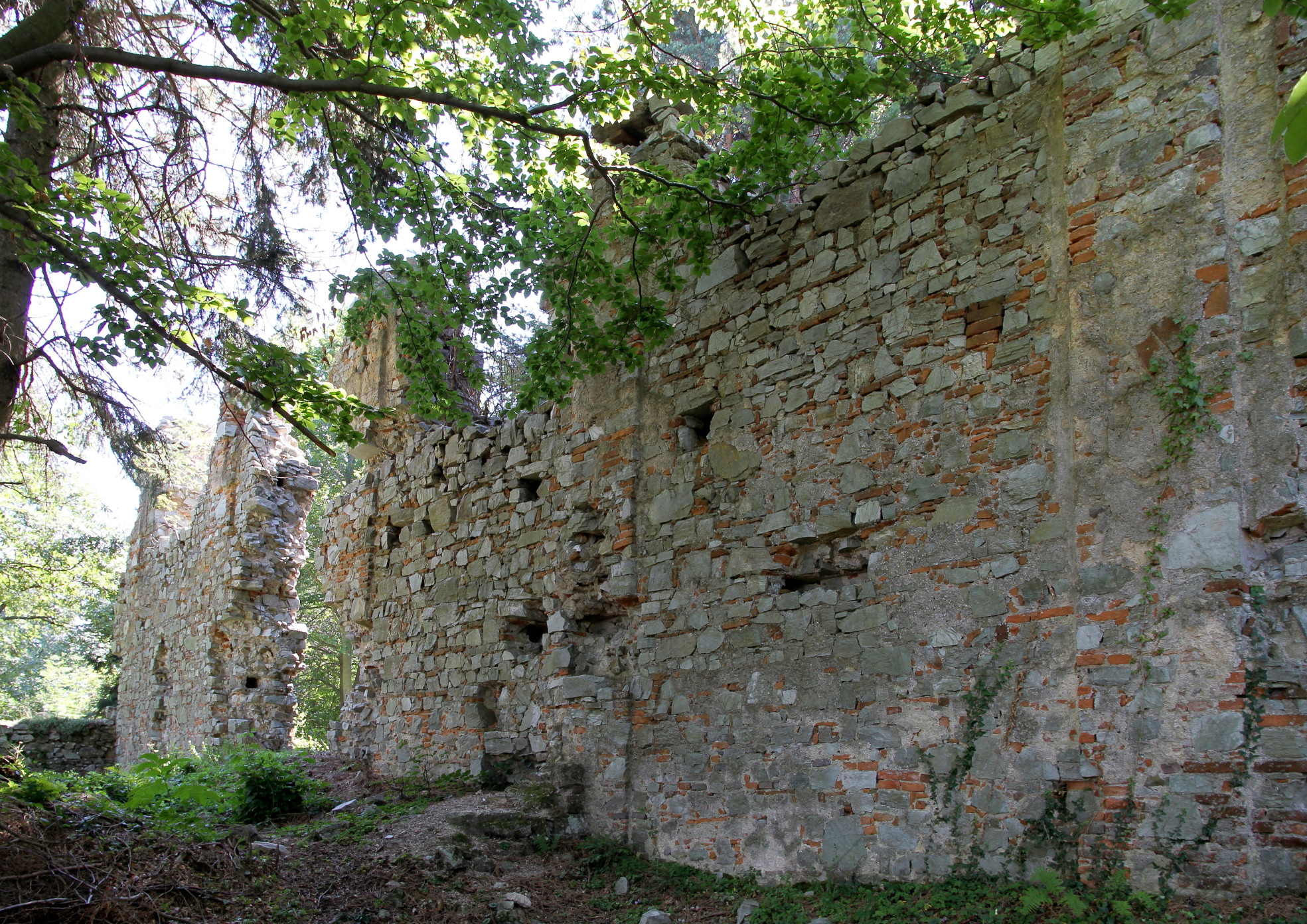 Der "letzte Rest" des ehemaligen Kamaldulenserklosters in Landsee, ein Ortsteil der burgenländischen Marktgemeinde Markt Sankt Martin. Das Kloster wurde von der Fürstin Eva Esterházy-Tököly 1701 gestiftet und bereits 1782 im Zuge der Josephinischen Reformen wieder aufgehoben.